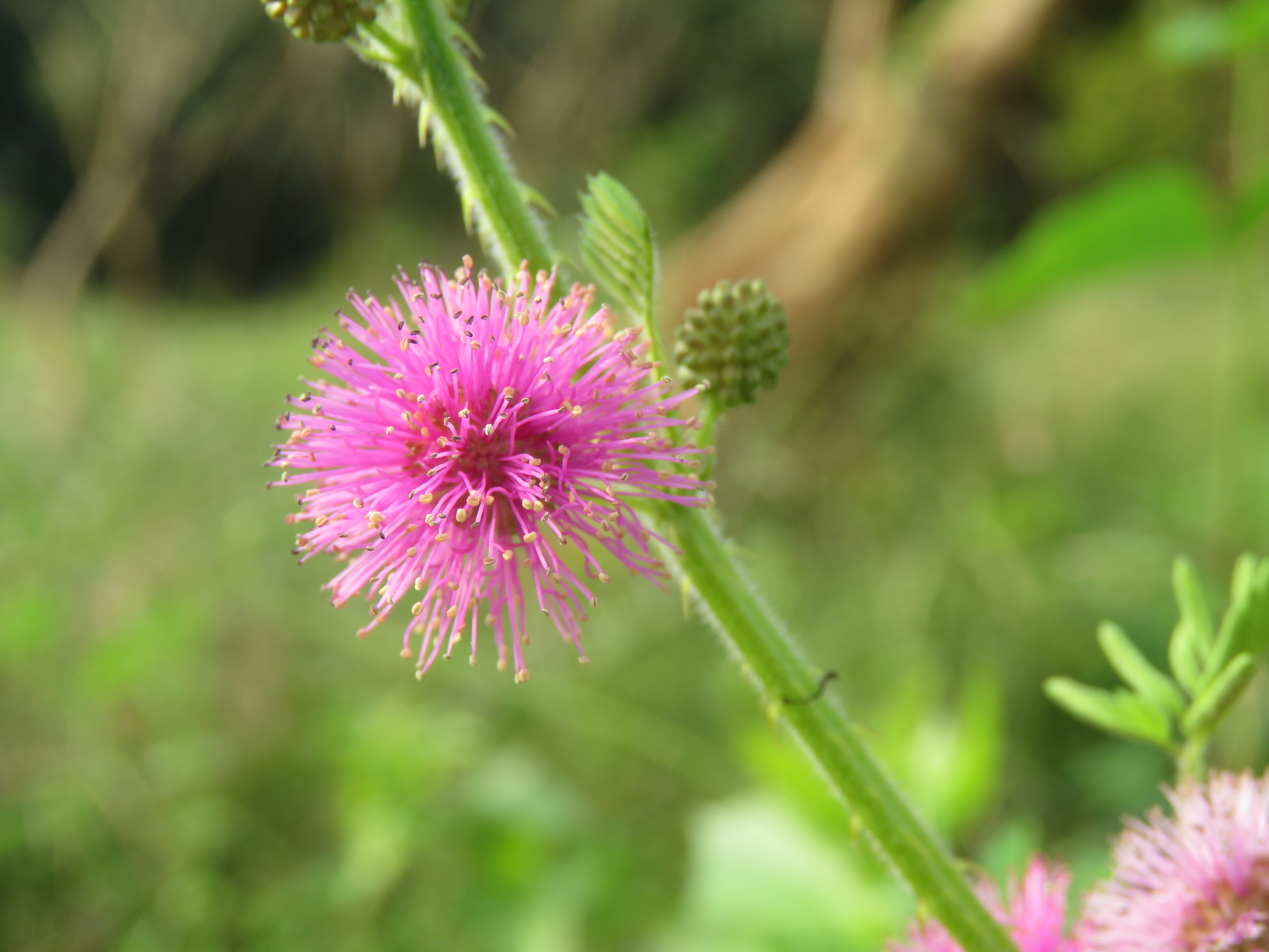 Photos by Vinayaraj